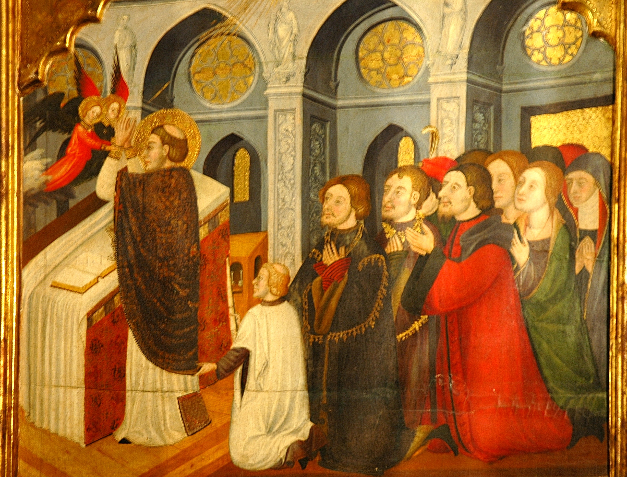 Retaule del Sant Esperit de la Seu de Manresa. Taula de la missa de Sant Martí amb un autoretrat dels tres germans Serra.